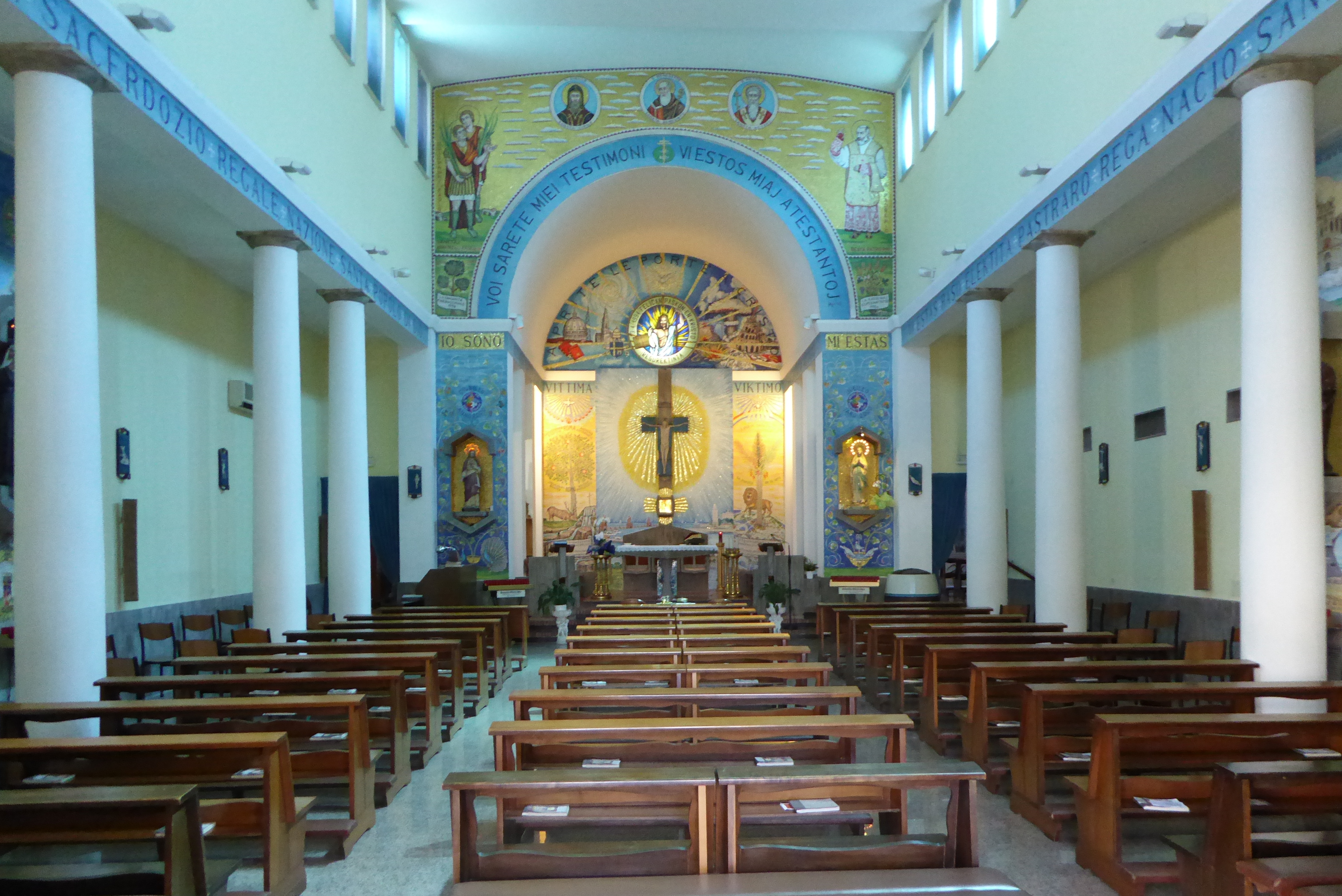 Rimini, Kirche Sankt Johannes und Paul in San Giuliano a Mare, Innenansicht mit zweisprachigen Mosaiken.